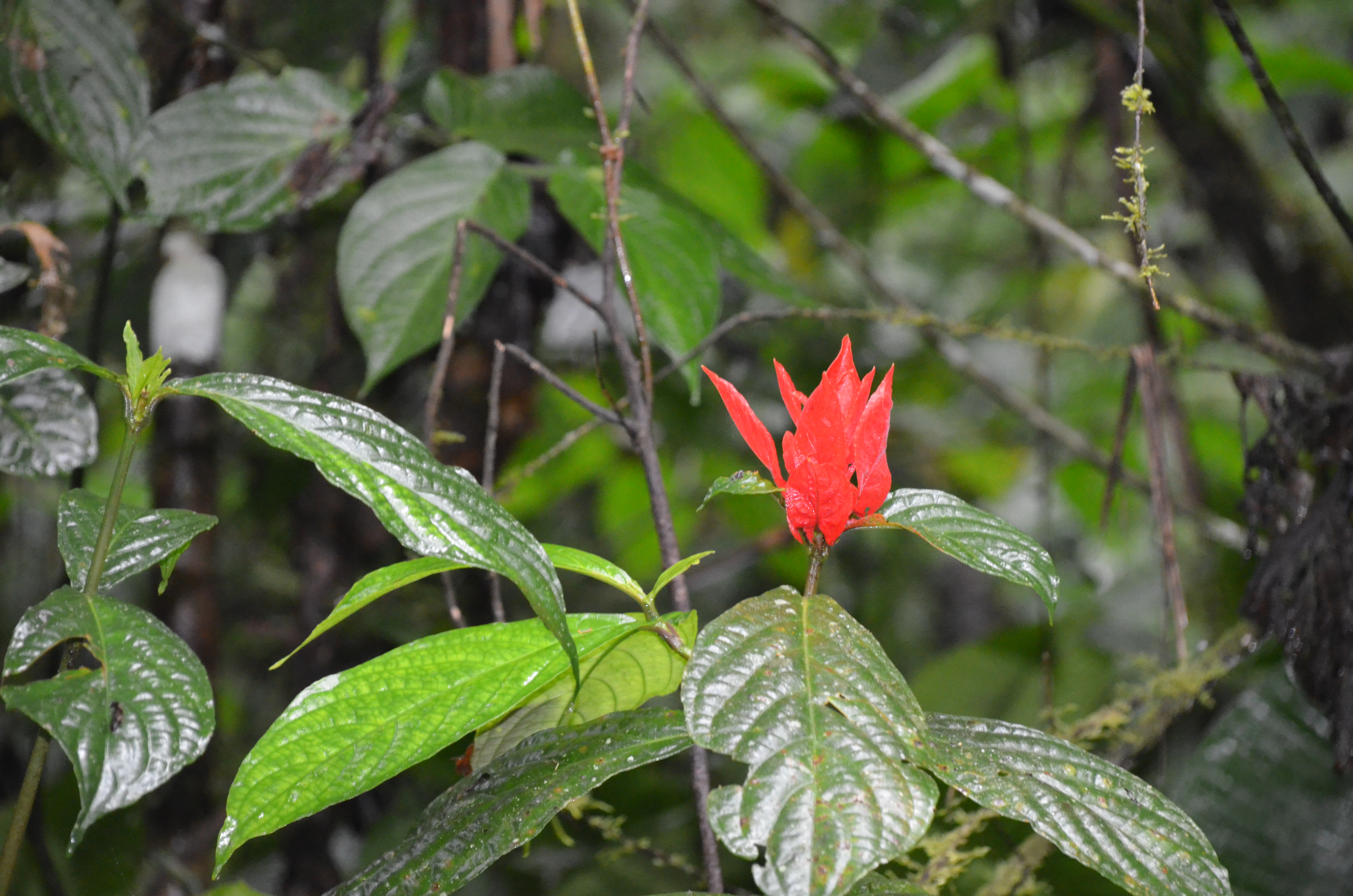 Flor ubicado en el bosque de las Cascadas del valle misterioso, Huambi, Sucua, Ecuador